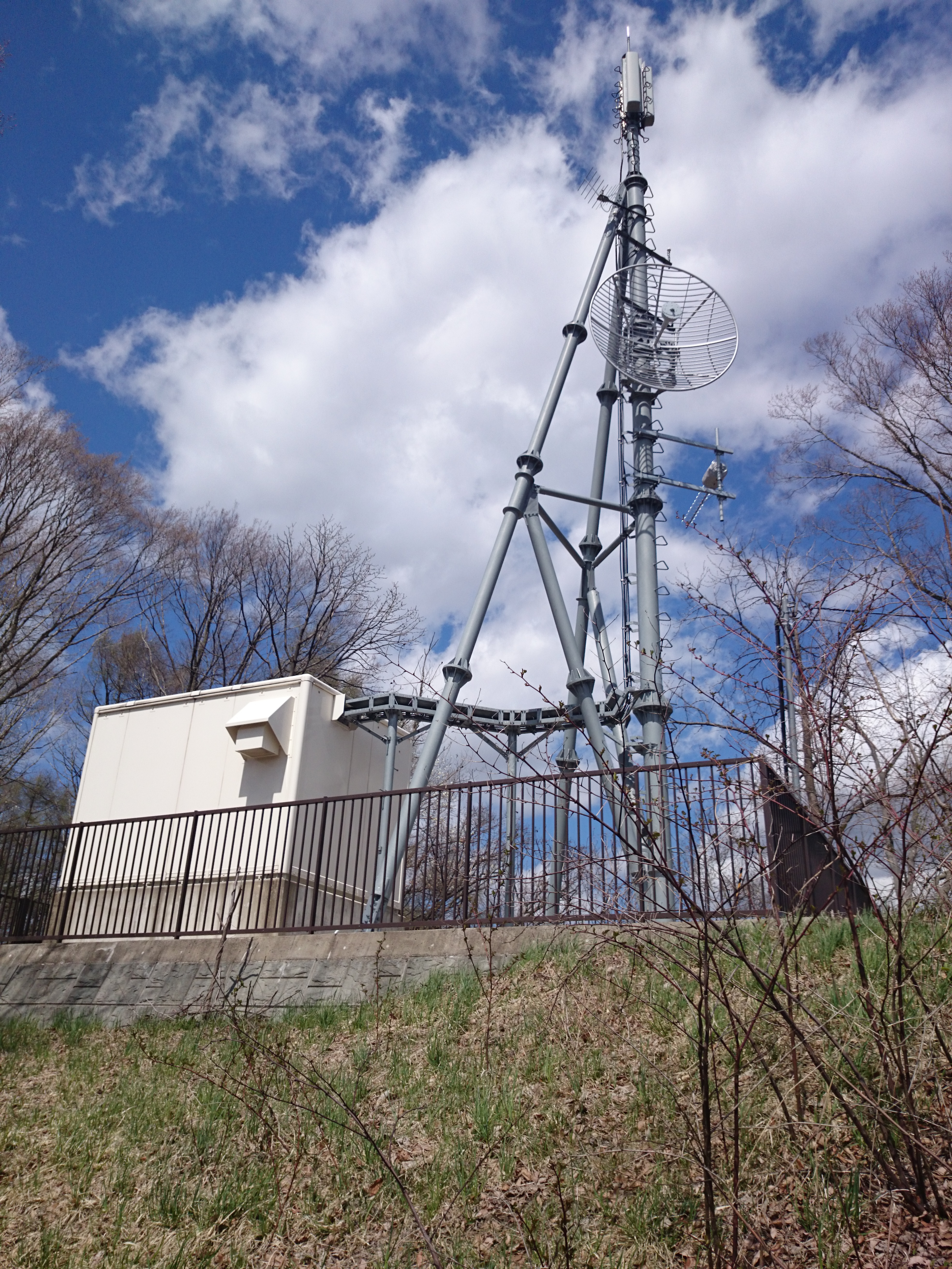 岩手沼宮内テレビ中継局1